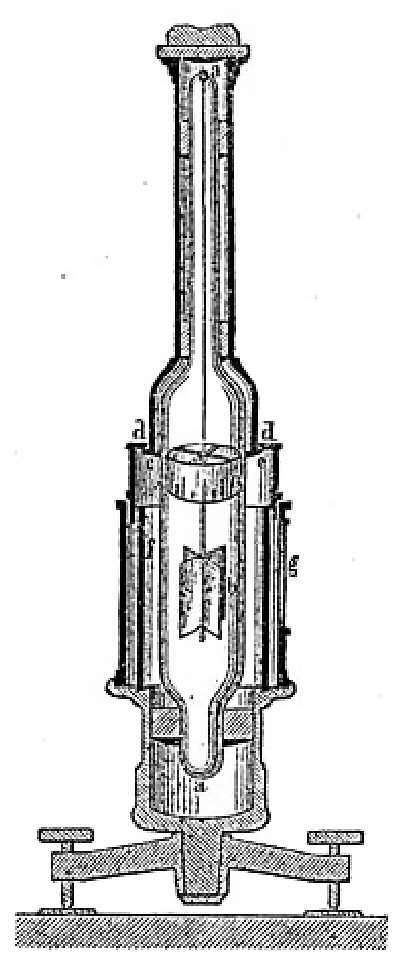 Skalenphotometer (Durchschnitt)